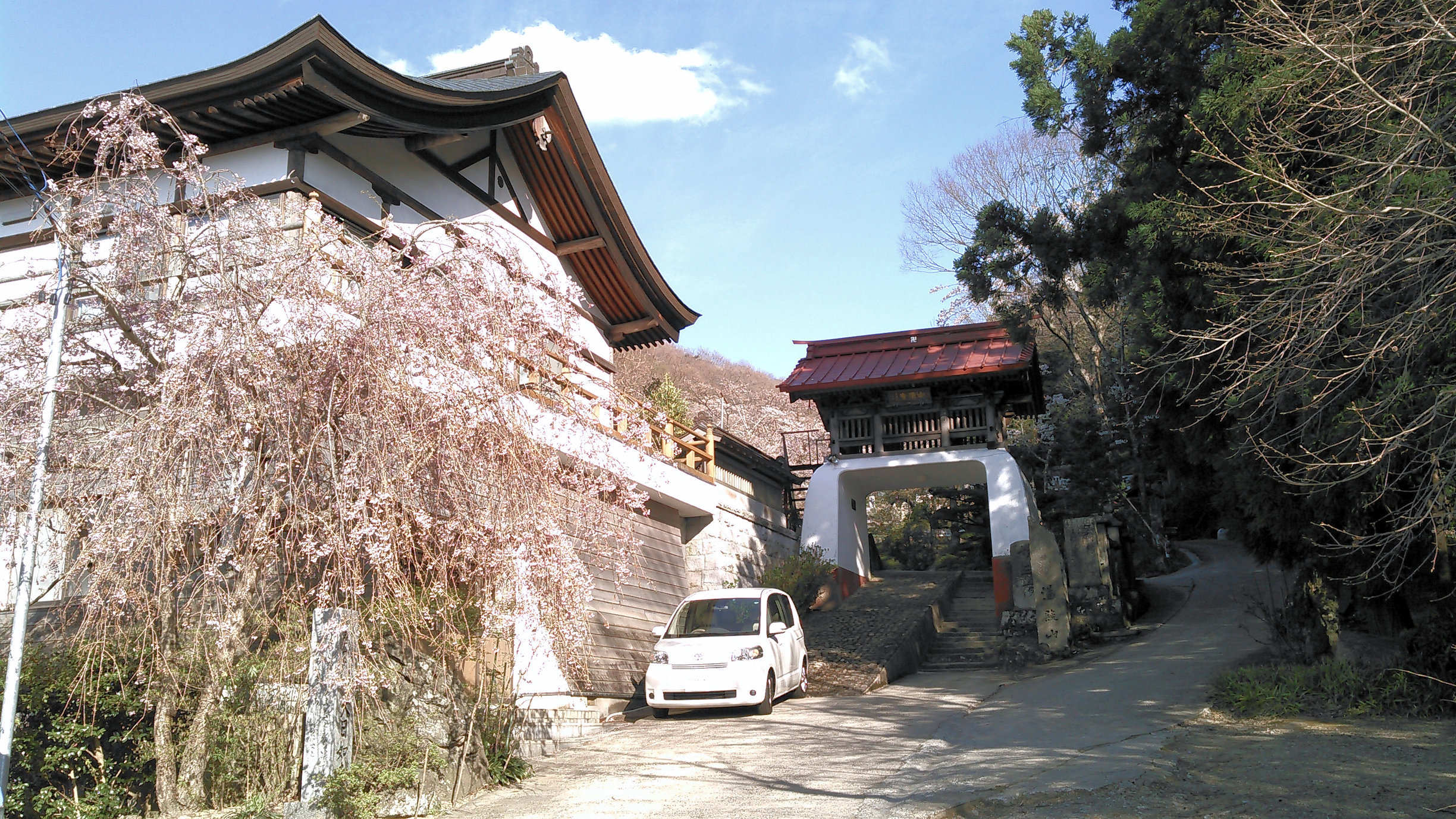 郡山市日和田町高倉の山清寺 入口付近 桜のシーズン